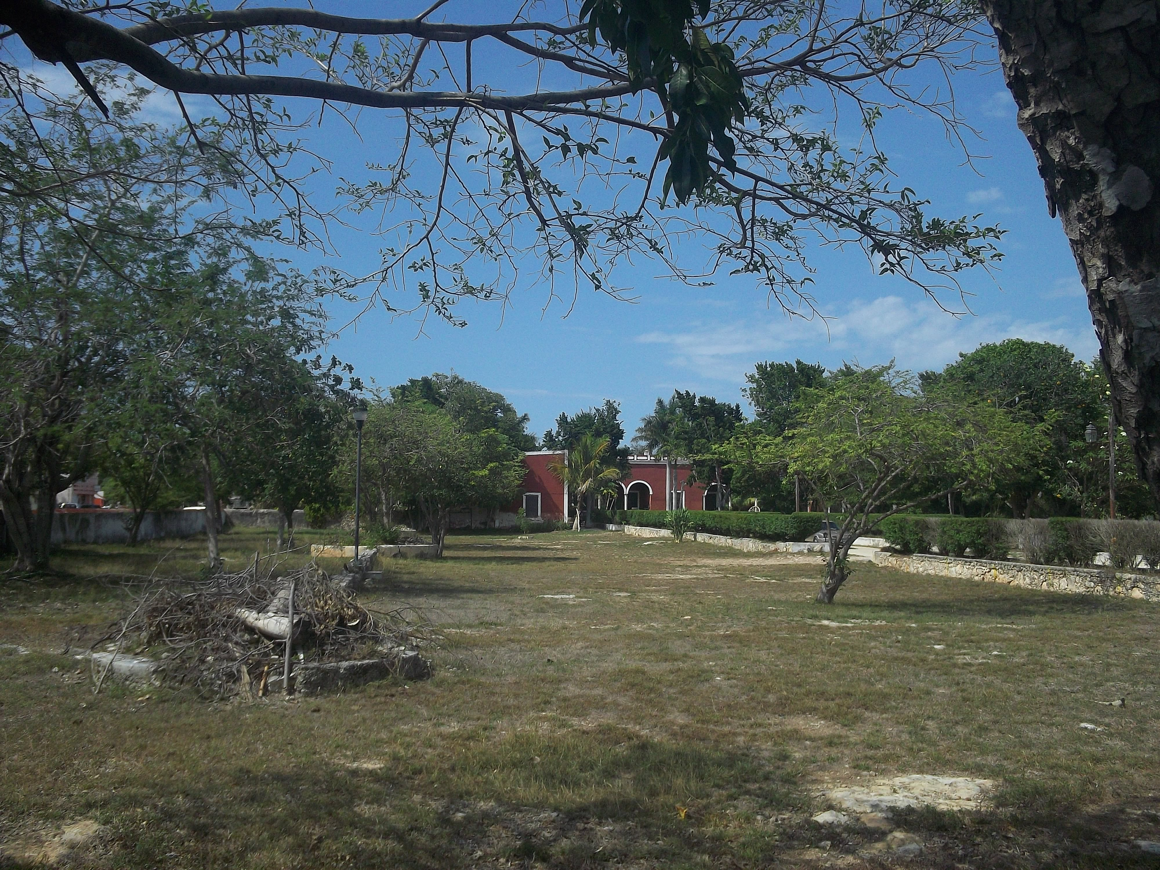 Exhacienda Chenkú, Mérida, Yucatán.